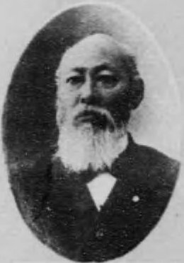 千田貞暁（1836-1908）